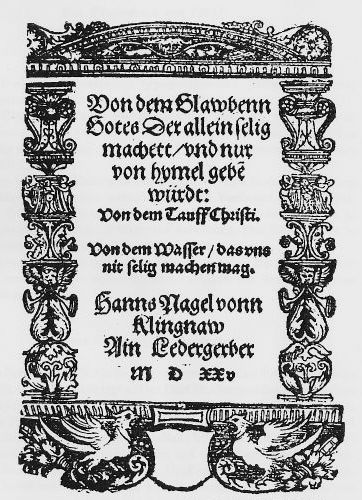 Titelblatt zu Hans Krüsis Taufbüchlein 1525. VD16 K 2466